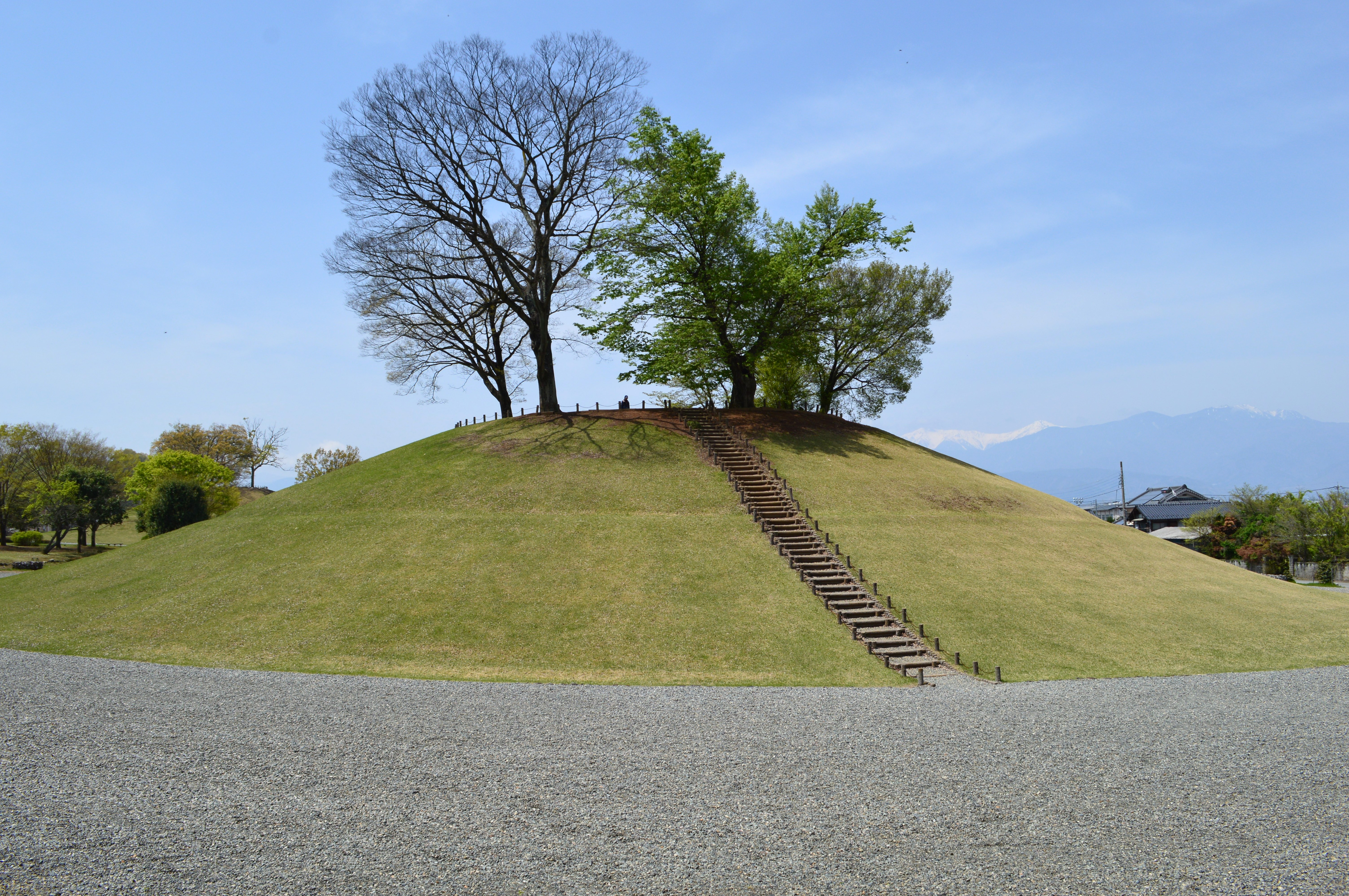 丸山塚古墳 (甲府市) 全景